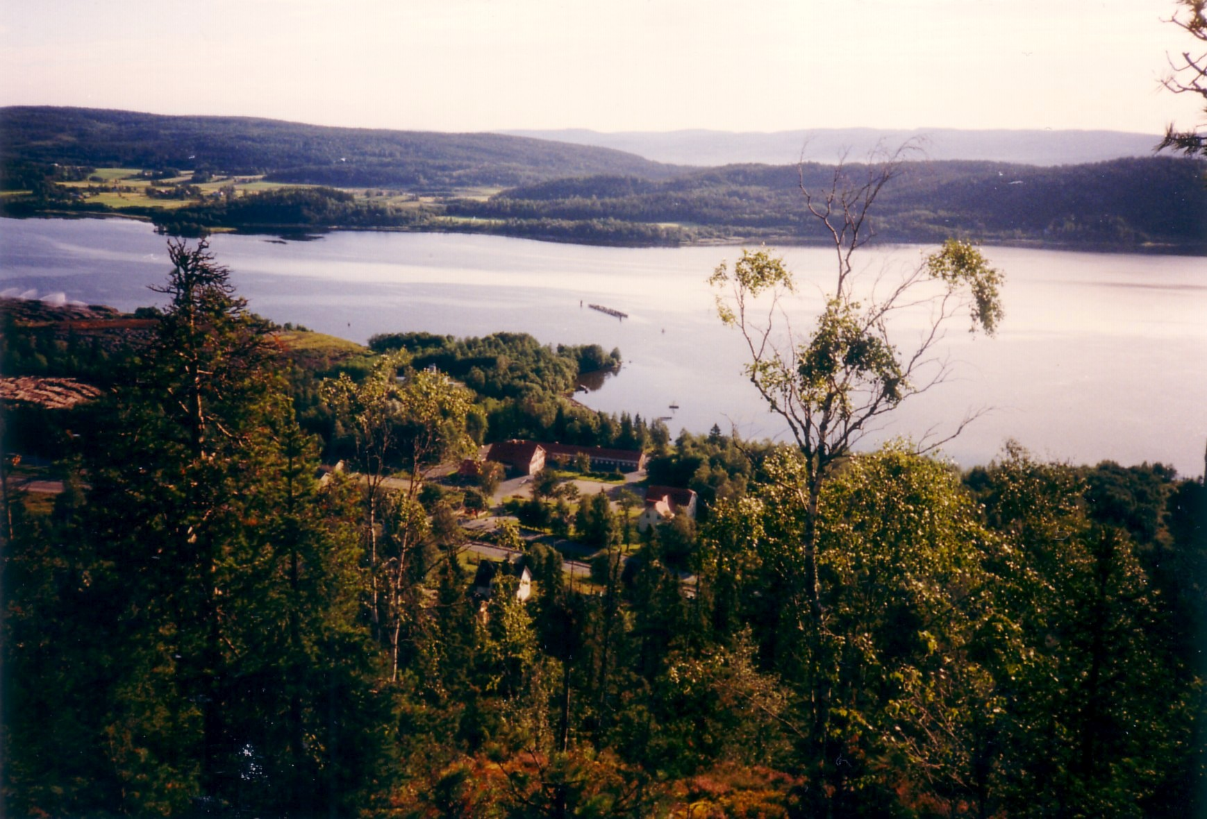 Utsikt över Bollstafjärden från Väjaberget